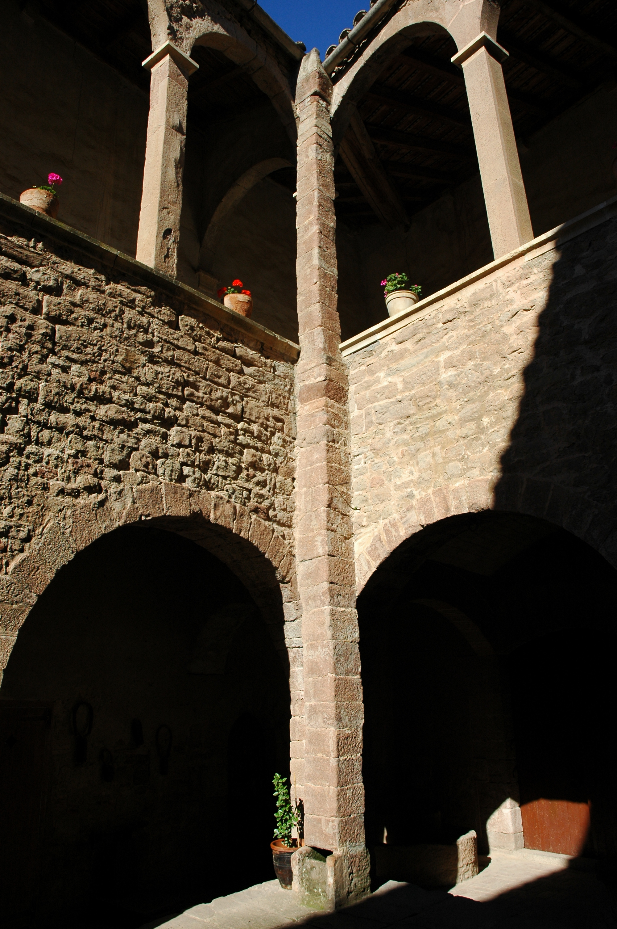 Castell de Balsareny